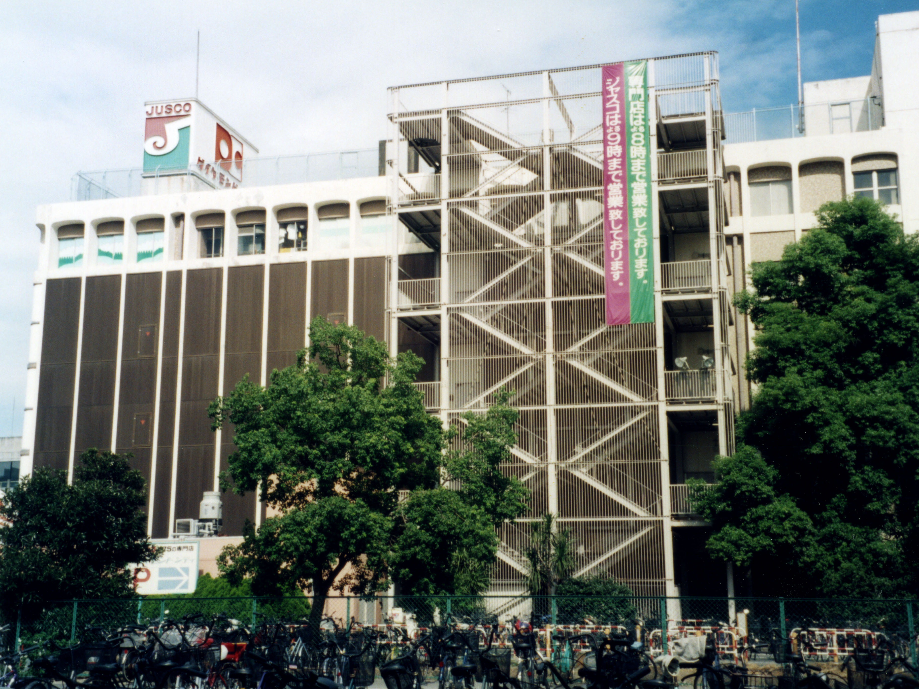 DIAMOND CITY Higashisumiyoshi,Uriwari Hirano-ku Osaka-City Osaka Japan